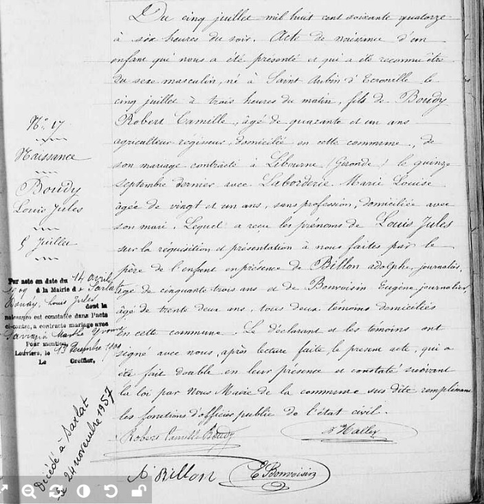 1874.07.05 - Acte de naissance de Louis Jules BOUDY